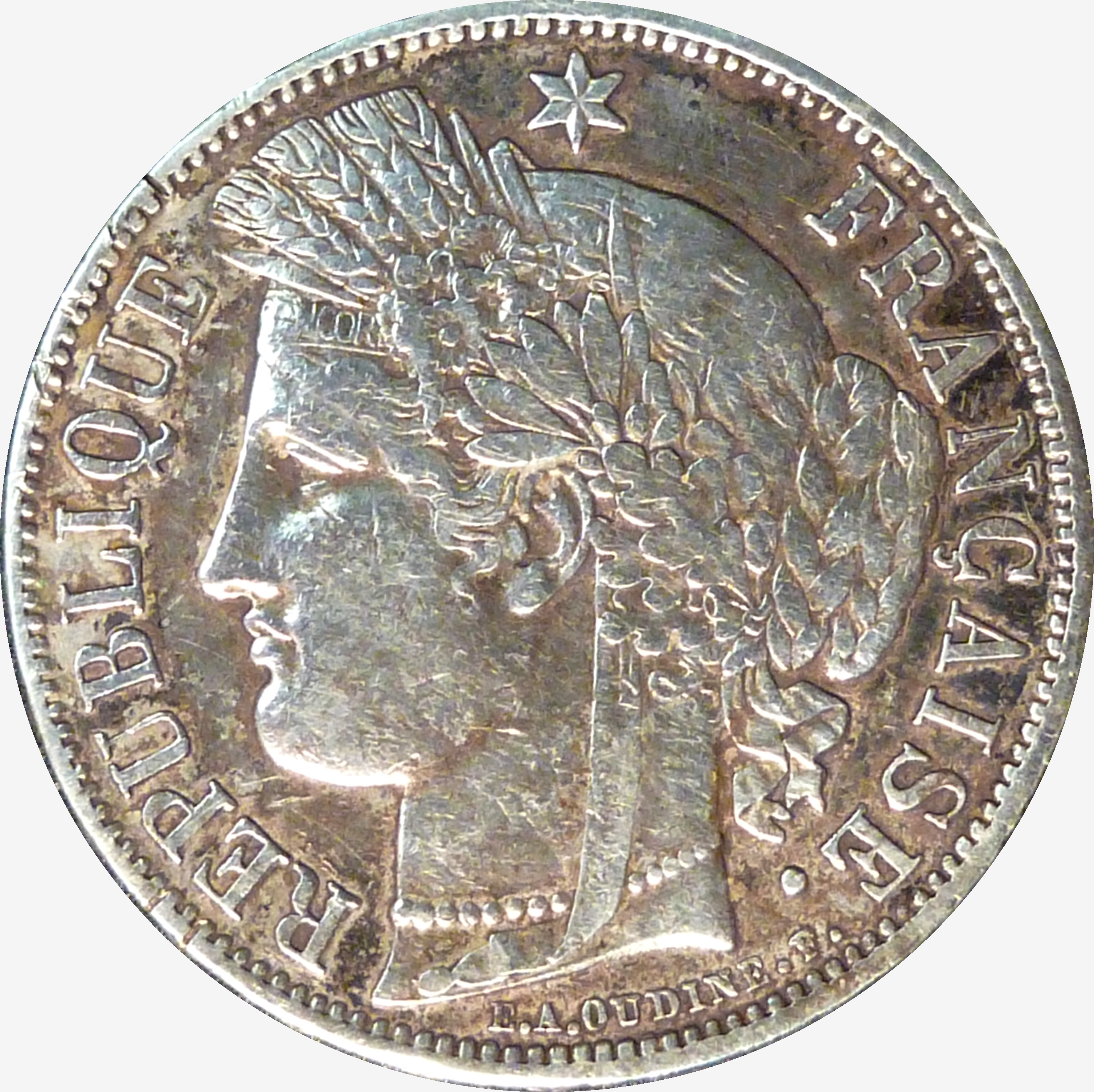 Pièce en argent de 5 francs, frappée en 1870 àParis sous le Gouvernement de la Défense Nationale. Diamètre 37 mm, poids 25 g. Graveur Eugène-André Oudiné.